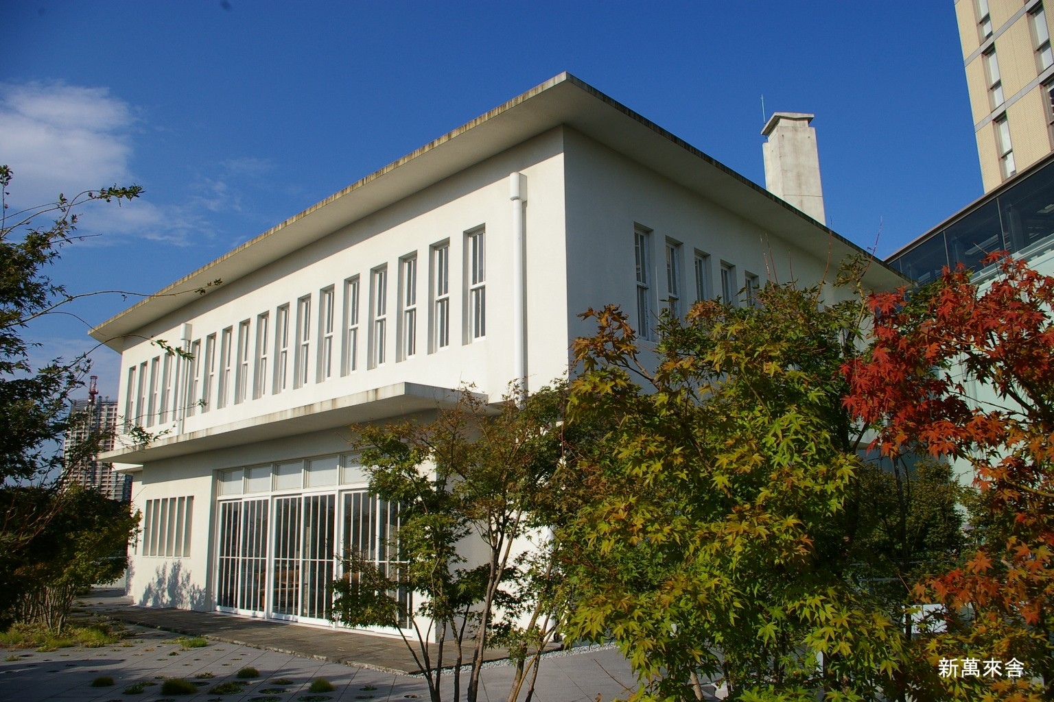 2009.5日本国内で塾生 (talk)が撮影。